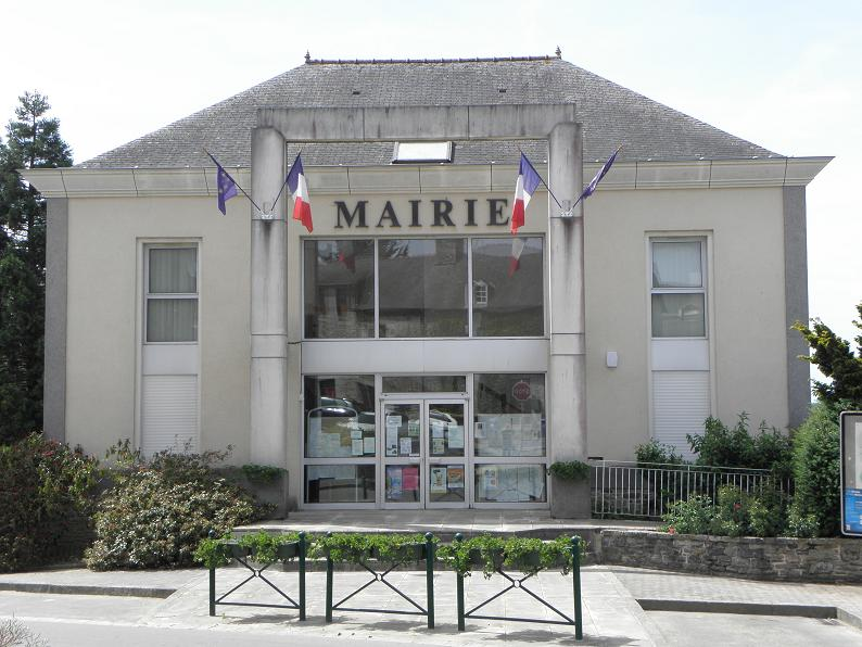 Mairie de Dourdain (35).